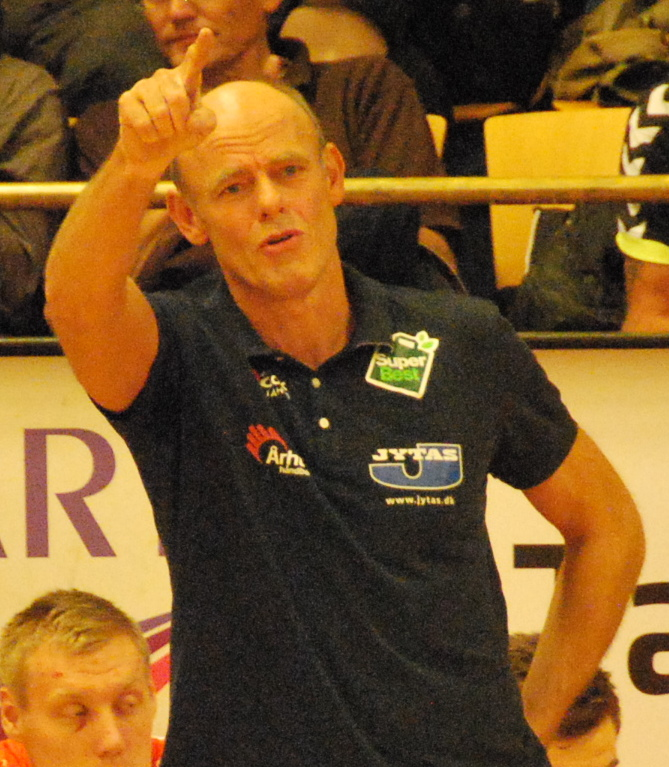 Håndboldtræner Erik Veje Rasmussen fra Århus Håndbold. Her i kamp mod Viborg Håndboldklub i Viborg Stadionhal.